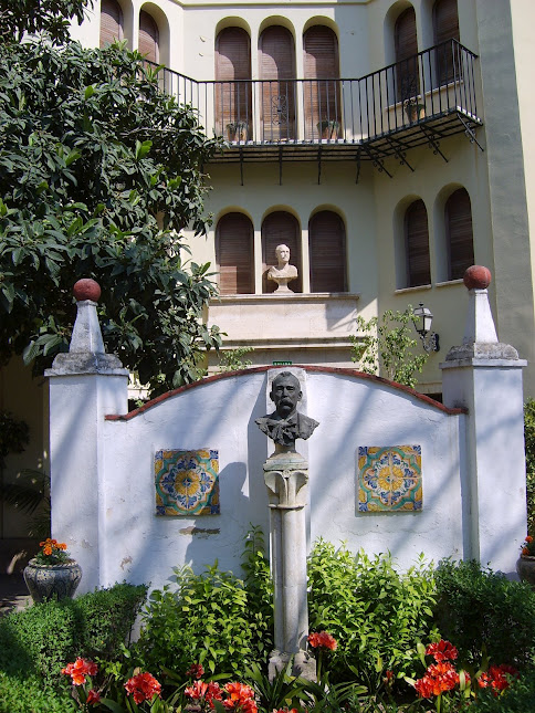 Jardín de la Casa Museo de Benlliure, Valencia (España)